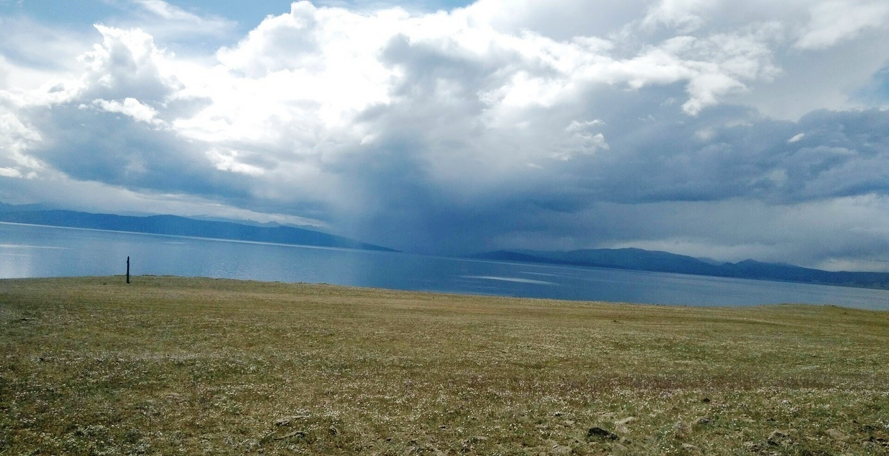 Rainy clouds over Lake Khövsgöl